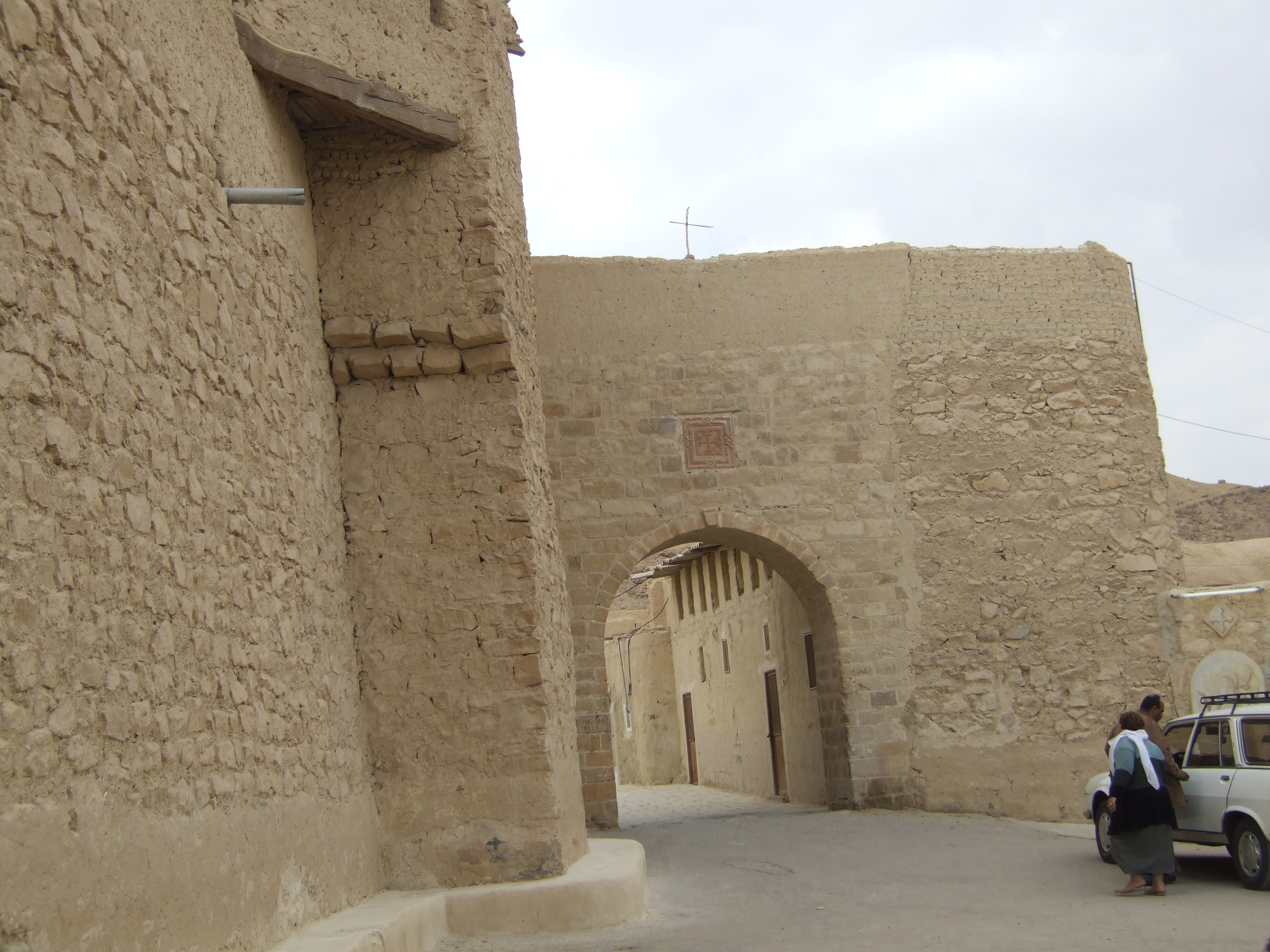 Foto LR - 2007